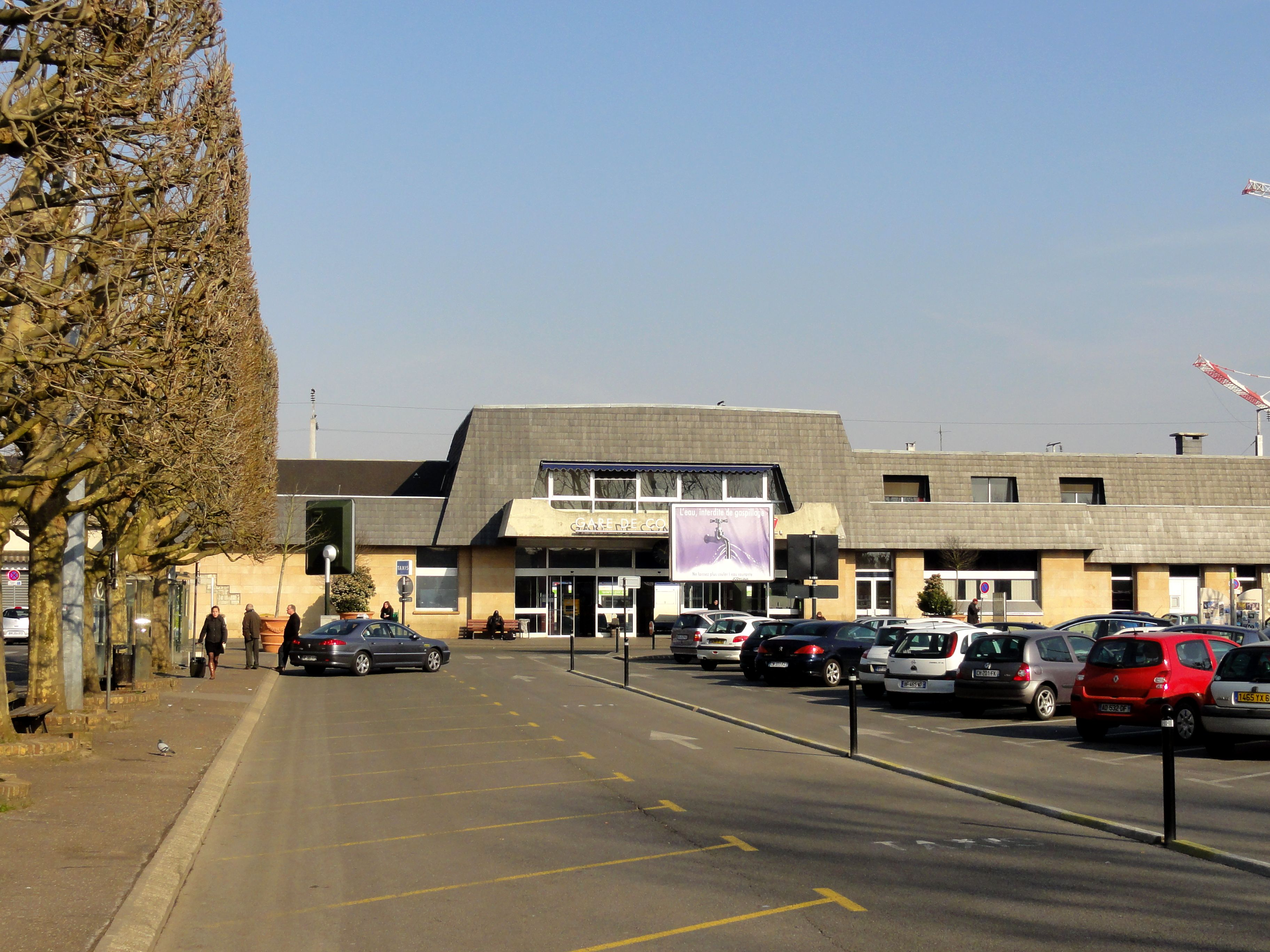 Bâtiment voyageurs - façade sur la place de la gare.